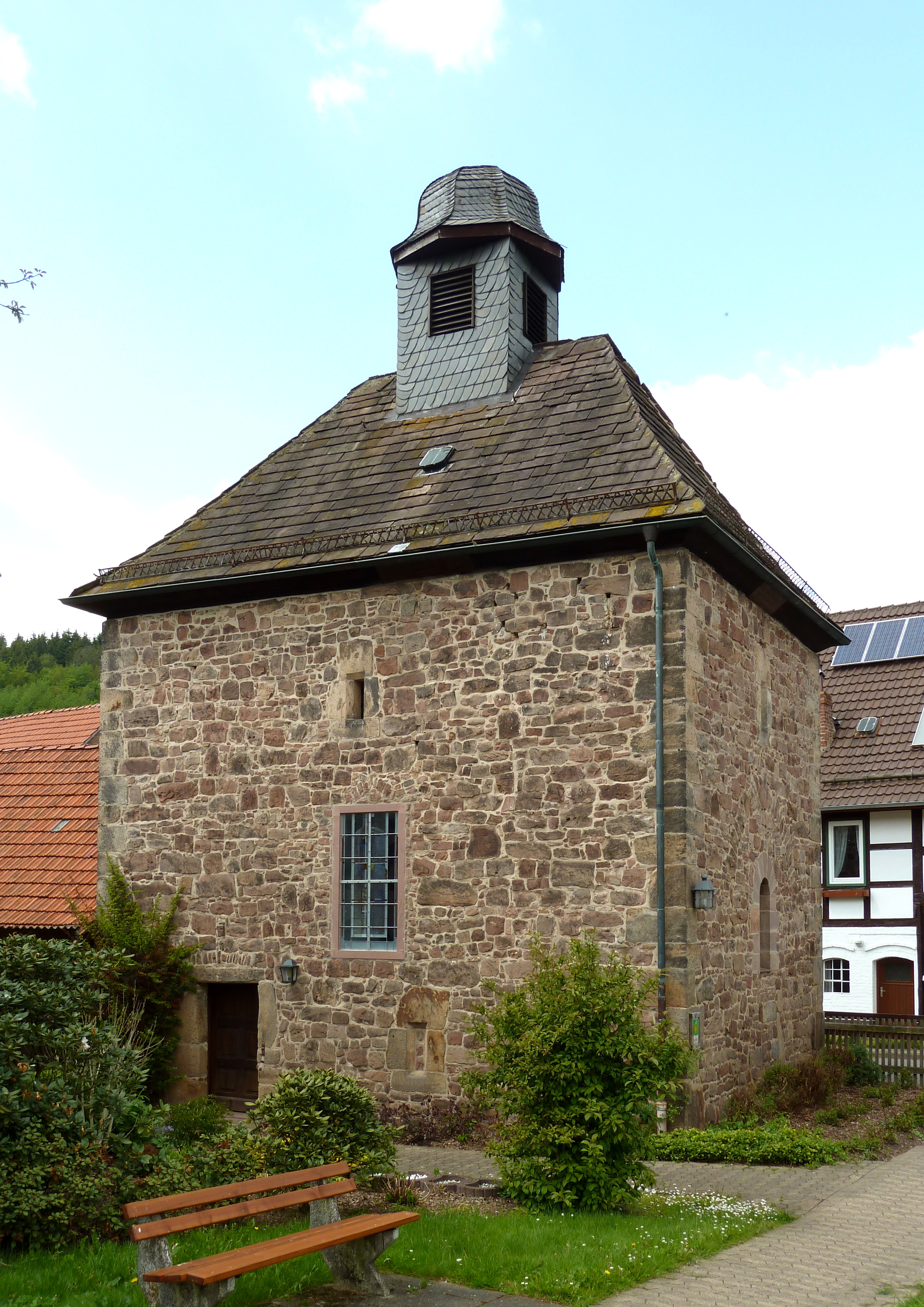 Ev.-luth. Kapelle in Gierswalde, Stadt Uslar, Niedersachsen. Errichtet um 1300, später wegen Geländeaufschüttung Geschosseinteilung und Türhöhe geändert, ehem. Fachwerkobergeschoss 1785 entfernt